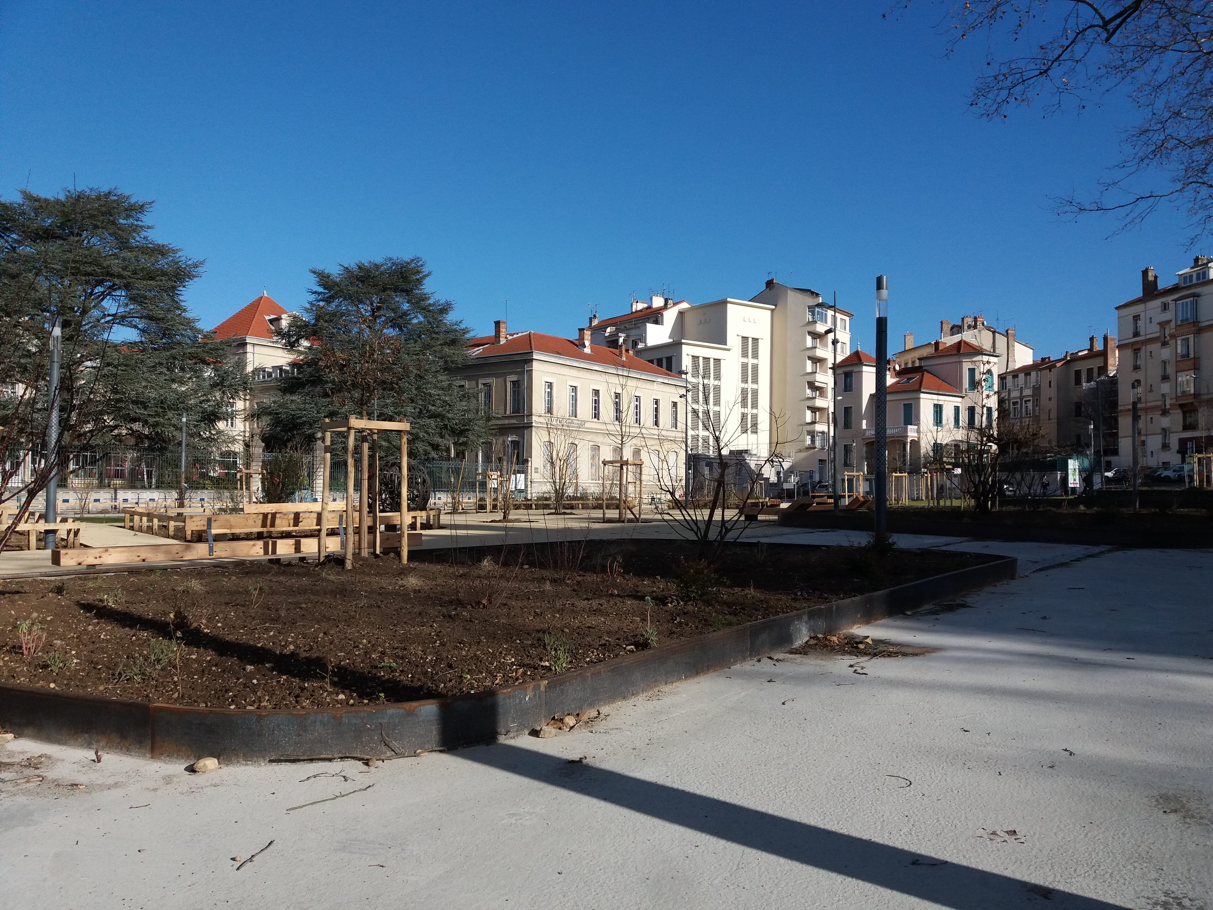 Fin des travaux.